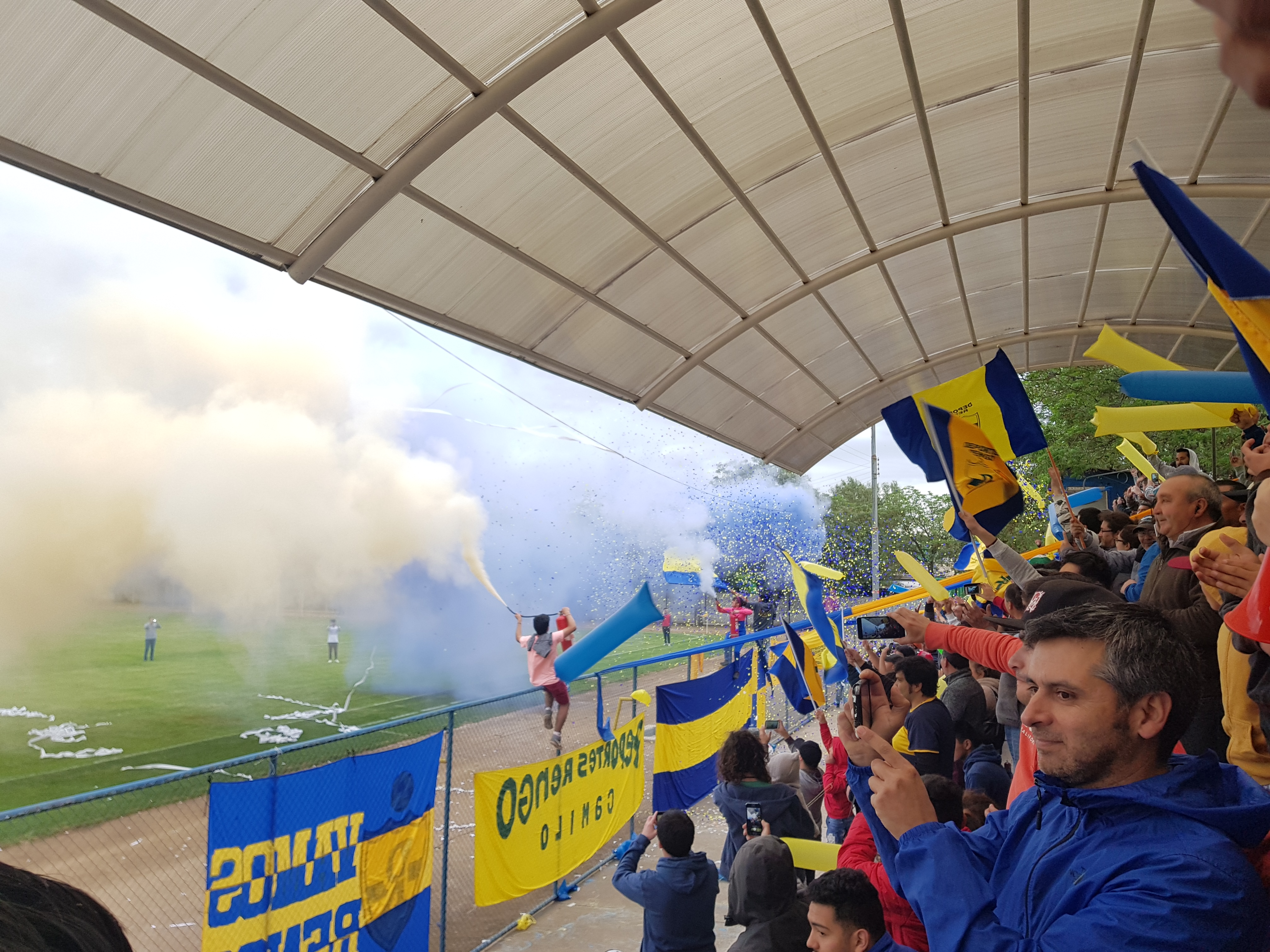 Barra de hinchas del Club de Deportes Rengo en el Estadio Municipal de Rengo